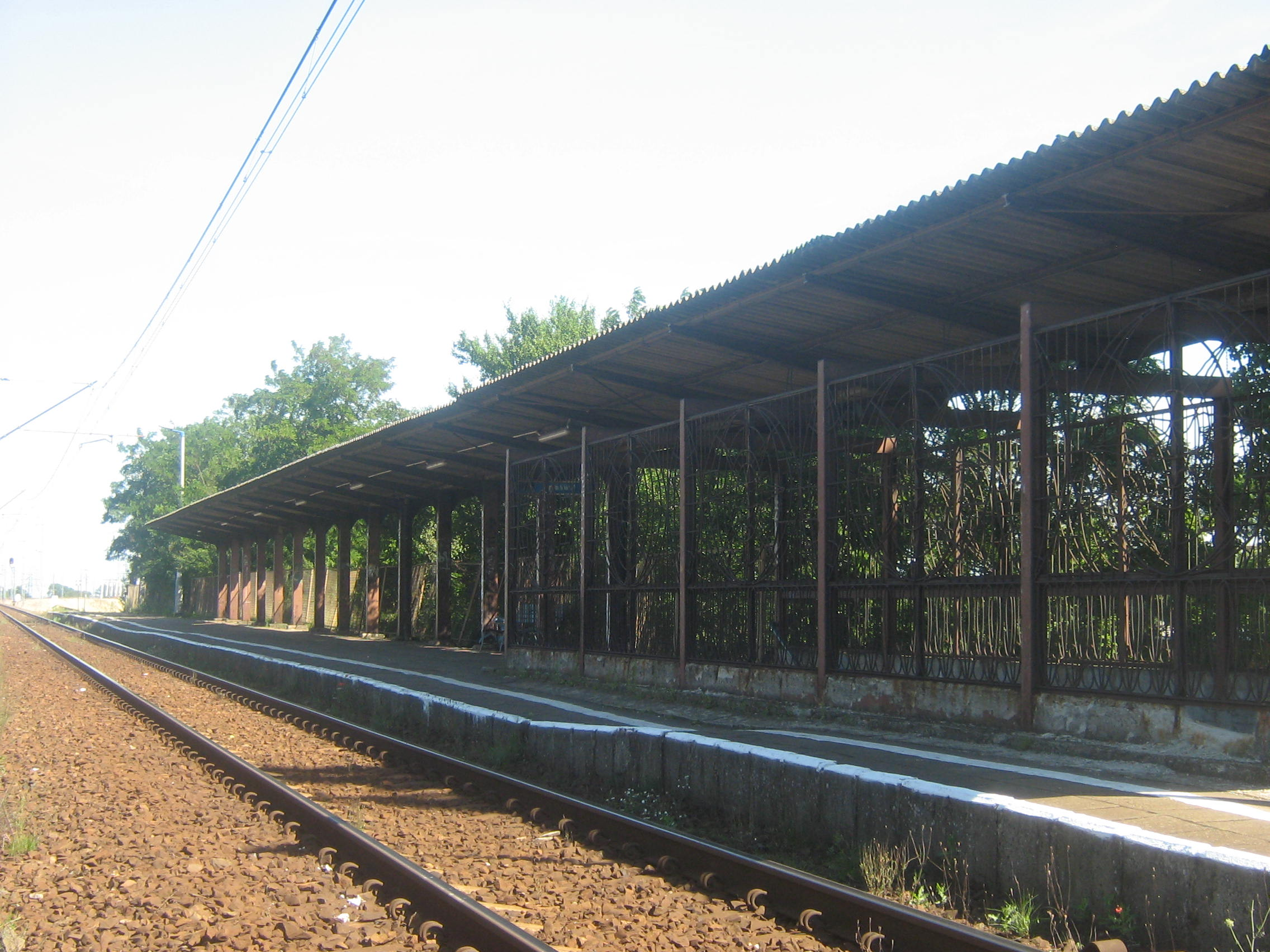 Peron w Wolinie.